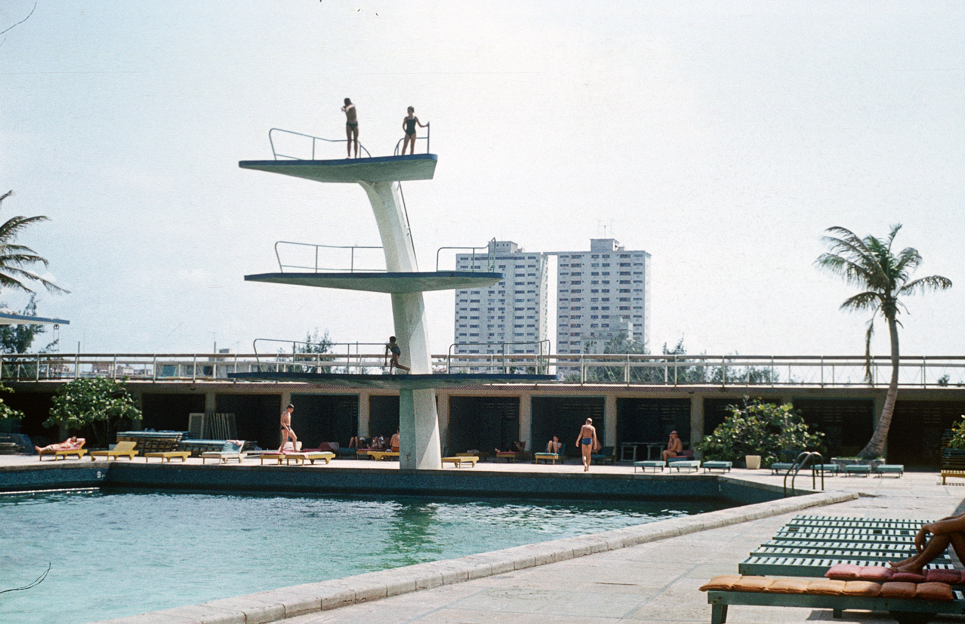 Havanna 1973; Hotel Riviera